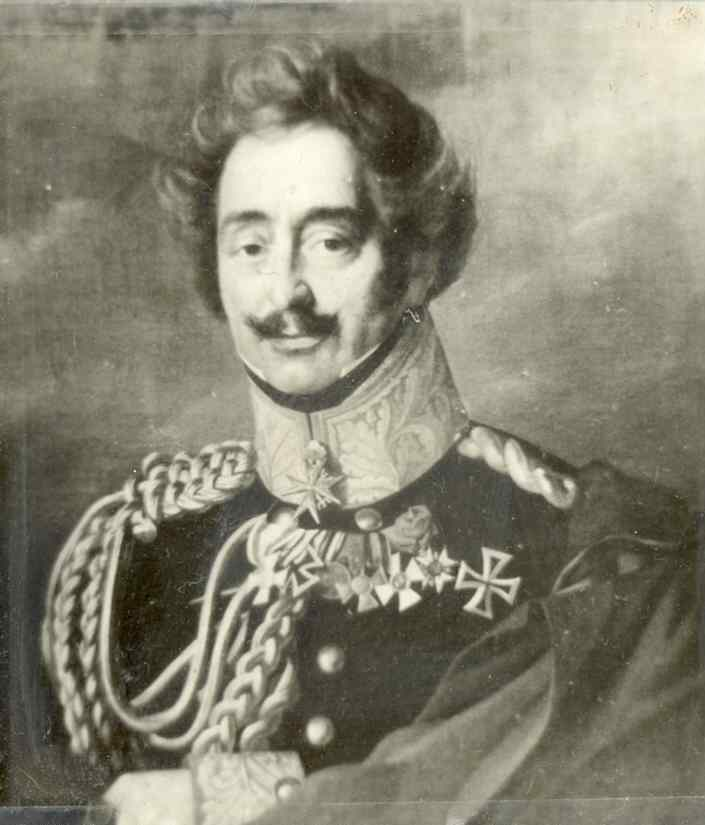 Generalleutnant Carl Thomas von Othegraven (1769–1844)